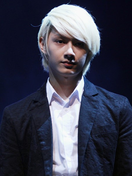 Wen Jun-hui performing on September 19, 2014.